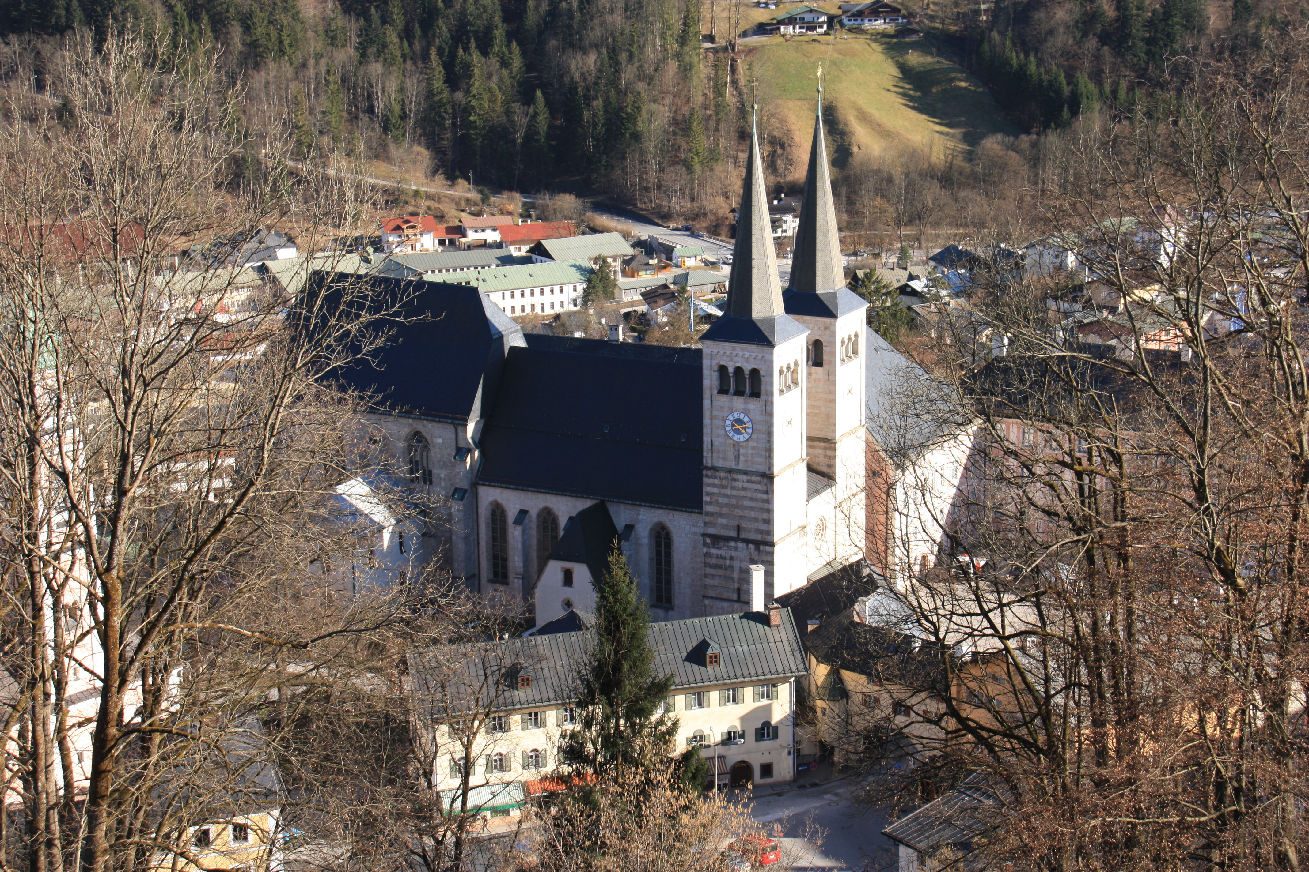 Die Berchtesgadener Stiftskirche St. Peter und Johannes der Täufer, vom Lockstein aus gesehen